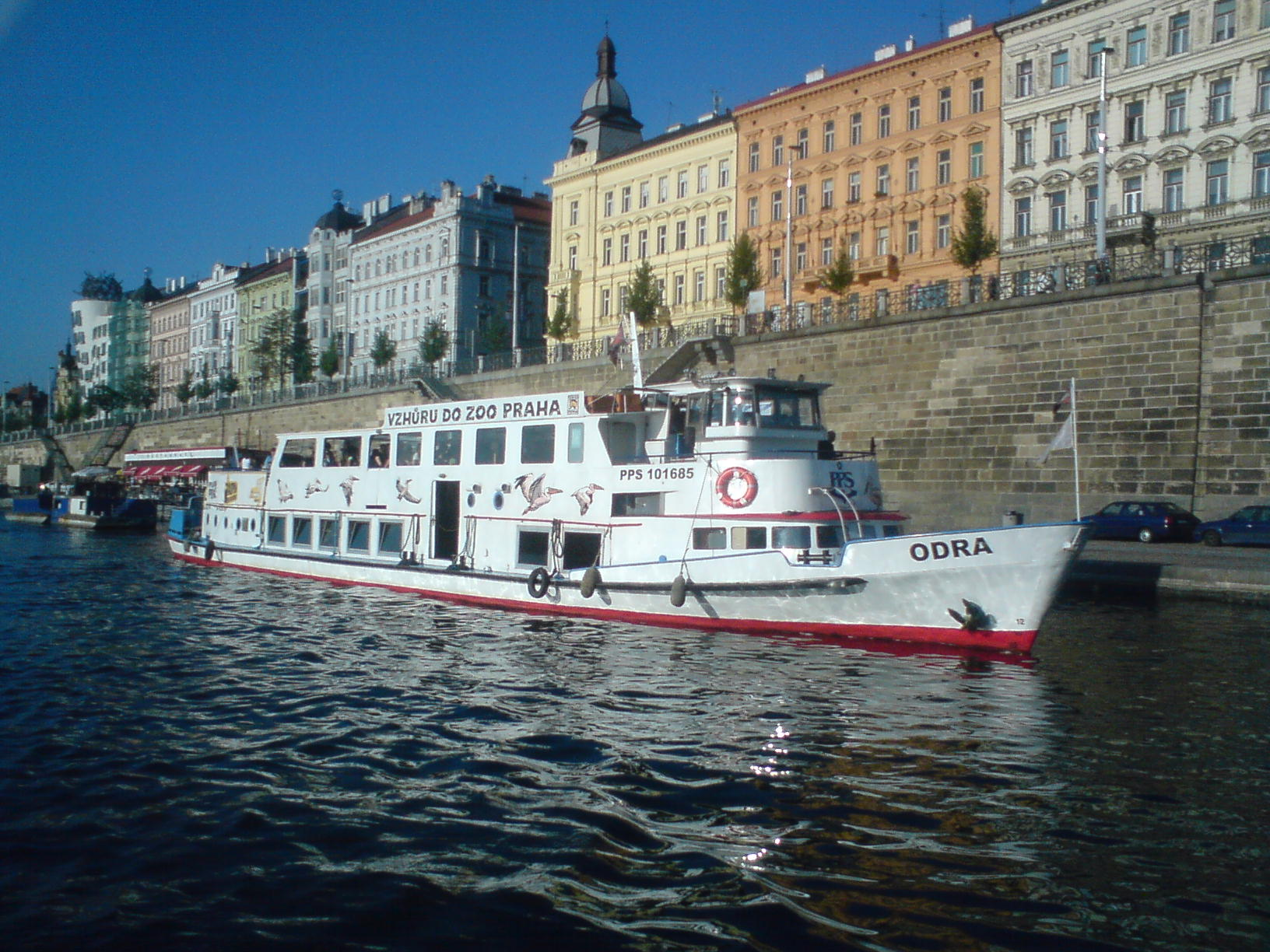 motorová osobní loď Odra v centrálním přístavišti PPS na Rašínově nábřeží